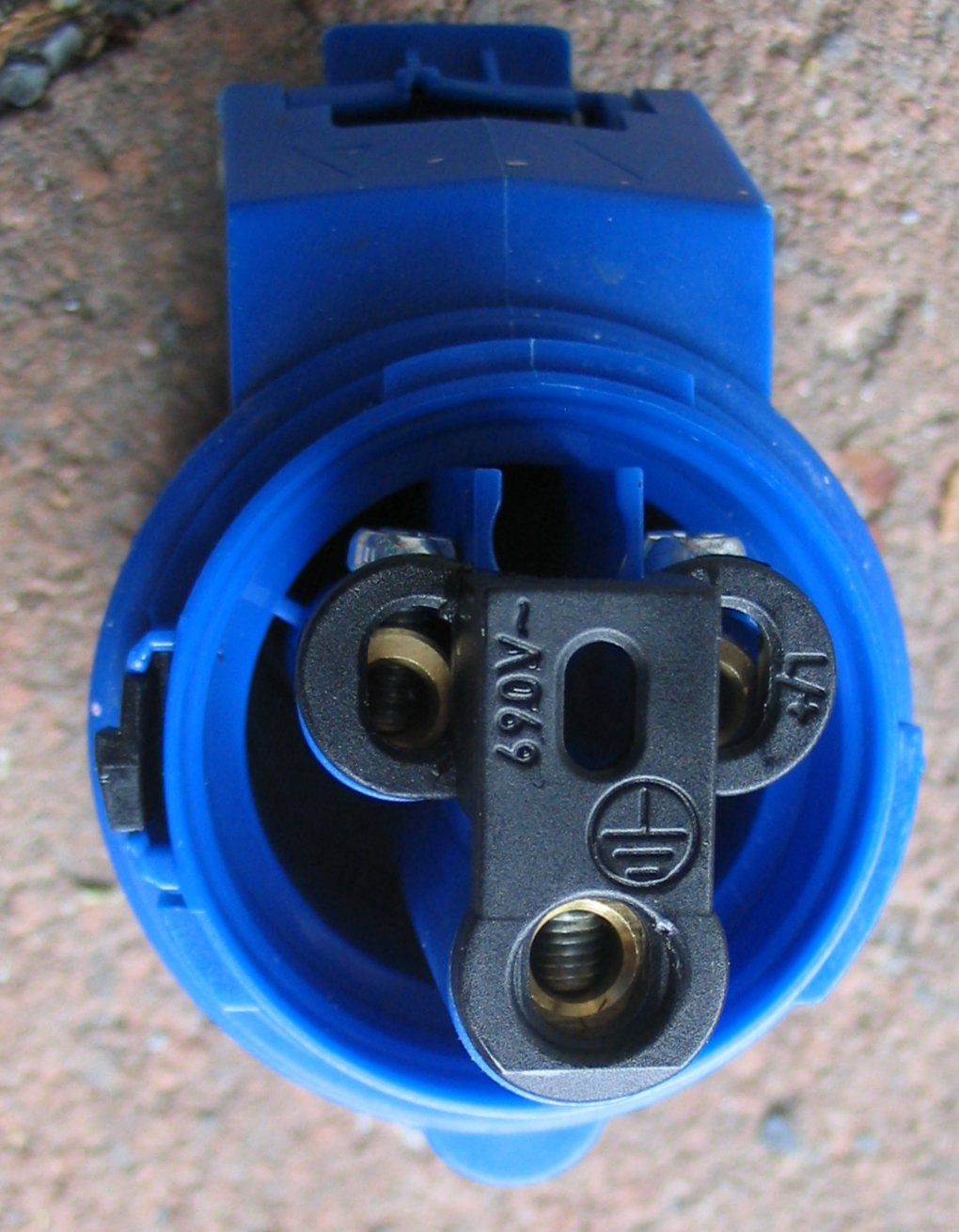 Interna einer blauen IEC-60309-L+N+PE-6h-Buchse mit Kennzeichnung der anzuschließenden Leiter Links: ohne, neutral (blau) Mitte: Erdungszeichen, PE (grün-gelb) Rechts: L/+, Phase (braun)